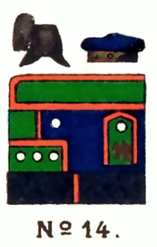 Uniform des Großherzoglich Mecklenburgischen Jäger-Bataillon Nr. 14. vor 1890.